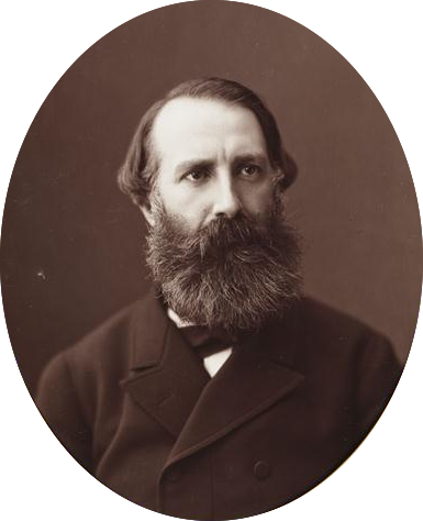 Photographie de Georges Picot, par Eug. Pirou